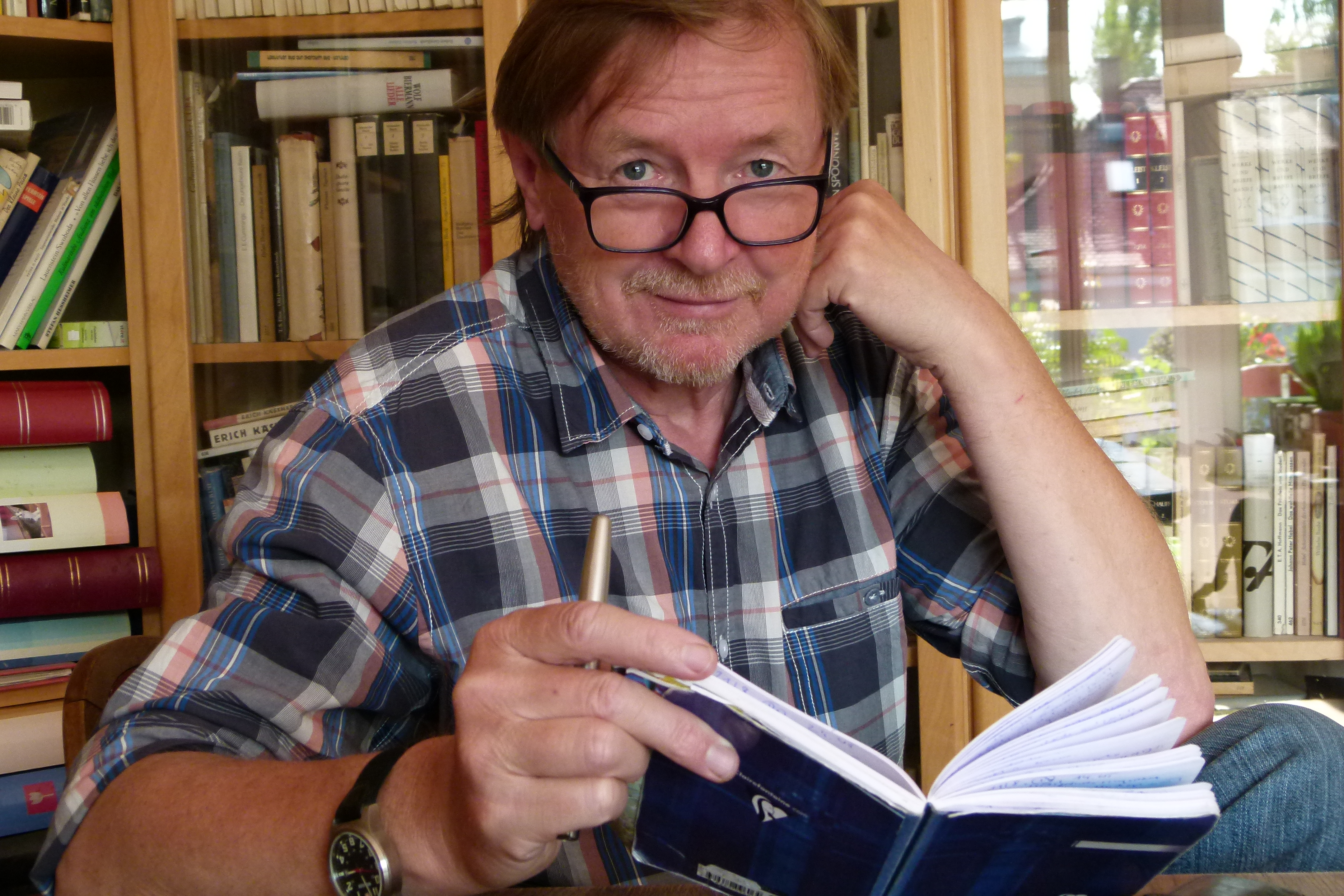 Porträt